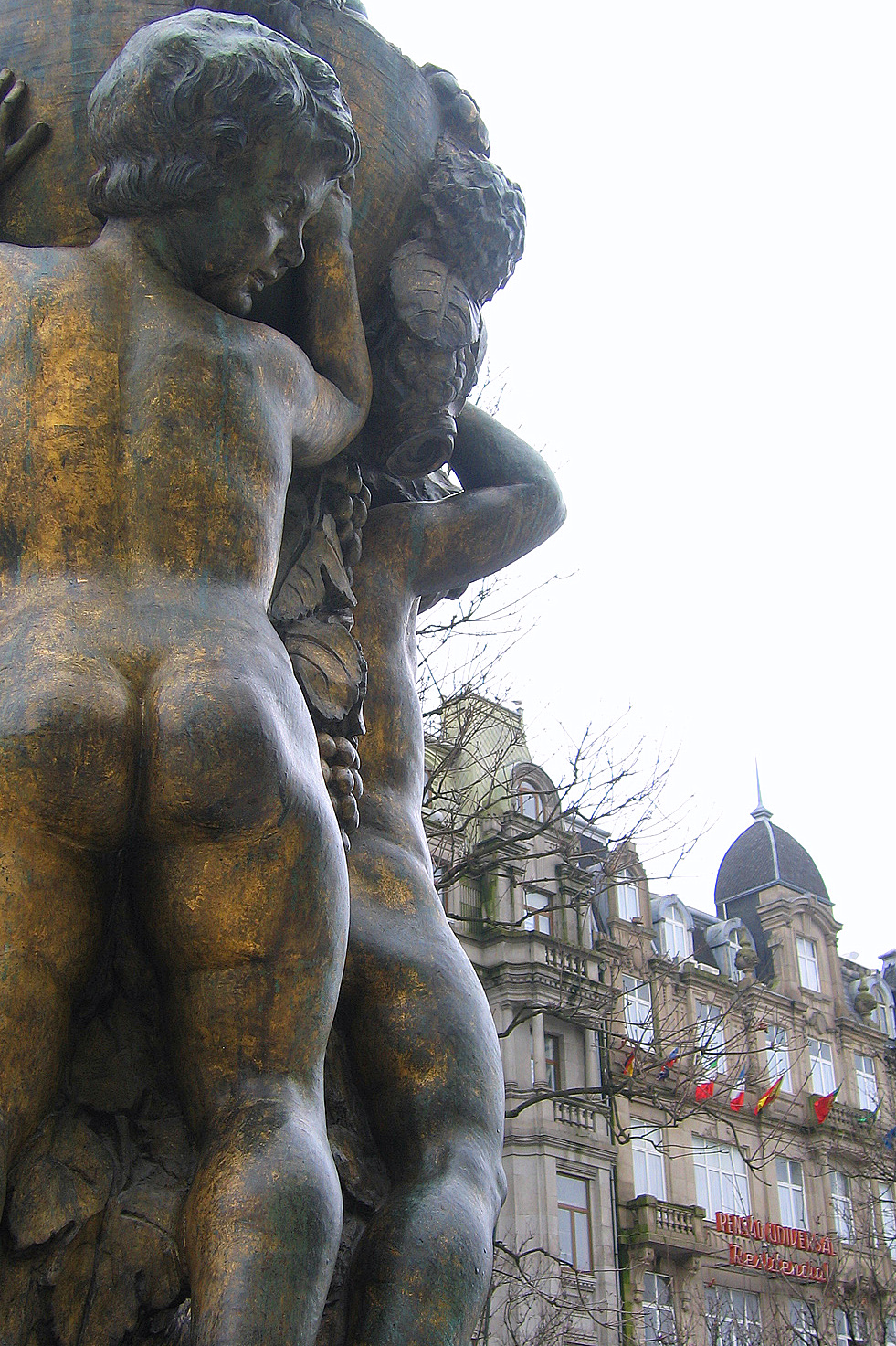 "Avenida dos Aliados" in Porto, Portugal